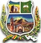 Escudo de Caracollo - Powered by rithchard